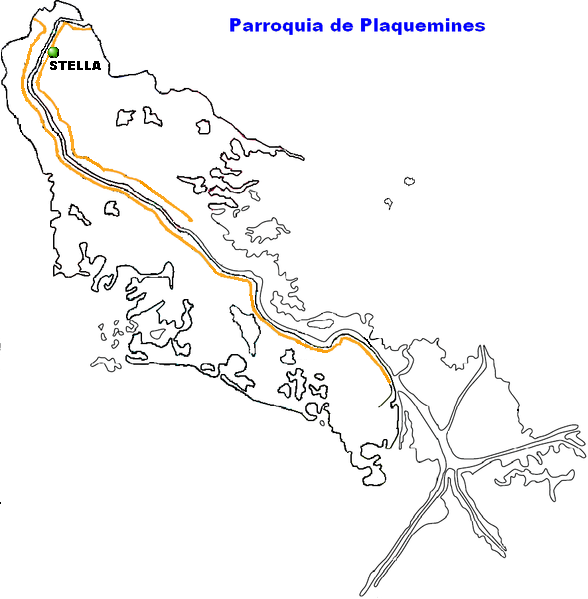 Stella, Louisiana